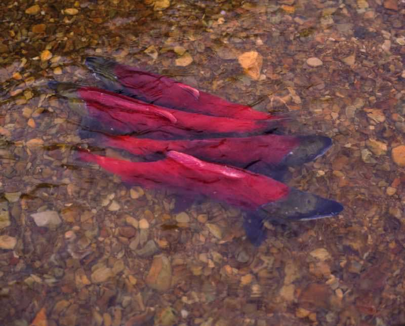 Salmons (Kamchatka, Russia)